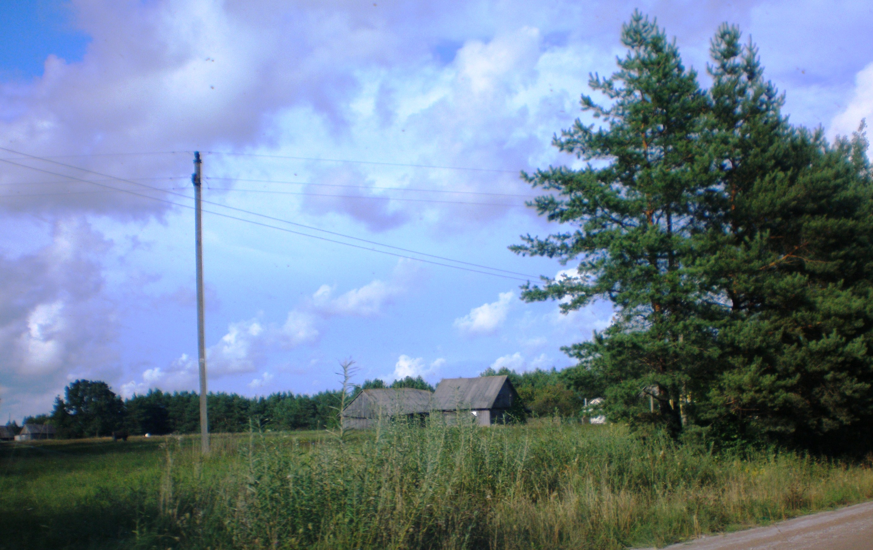 Guptilčiai, Kėdainių raj., Lietuva